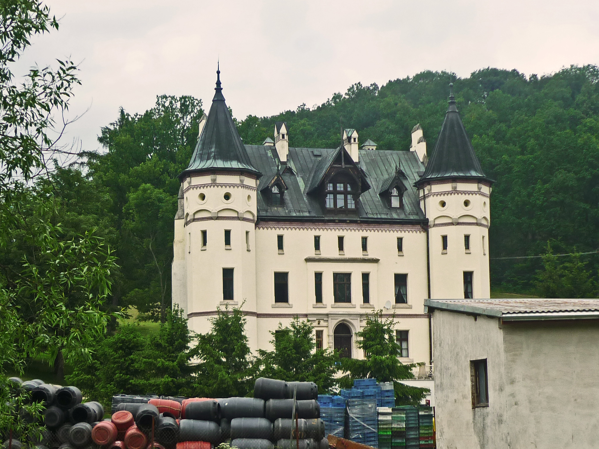 Oberes Schloss in Falkenhain (Sokolowiec) in Niederschlesien